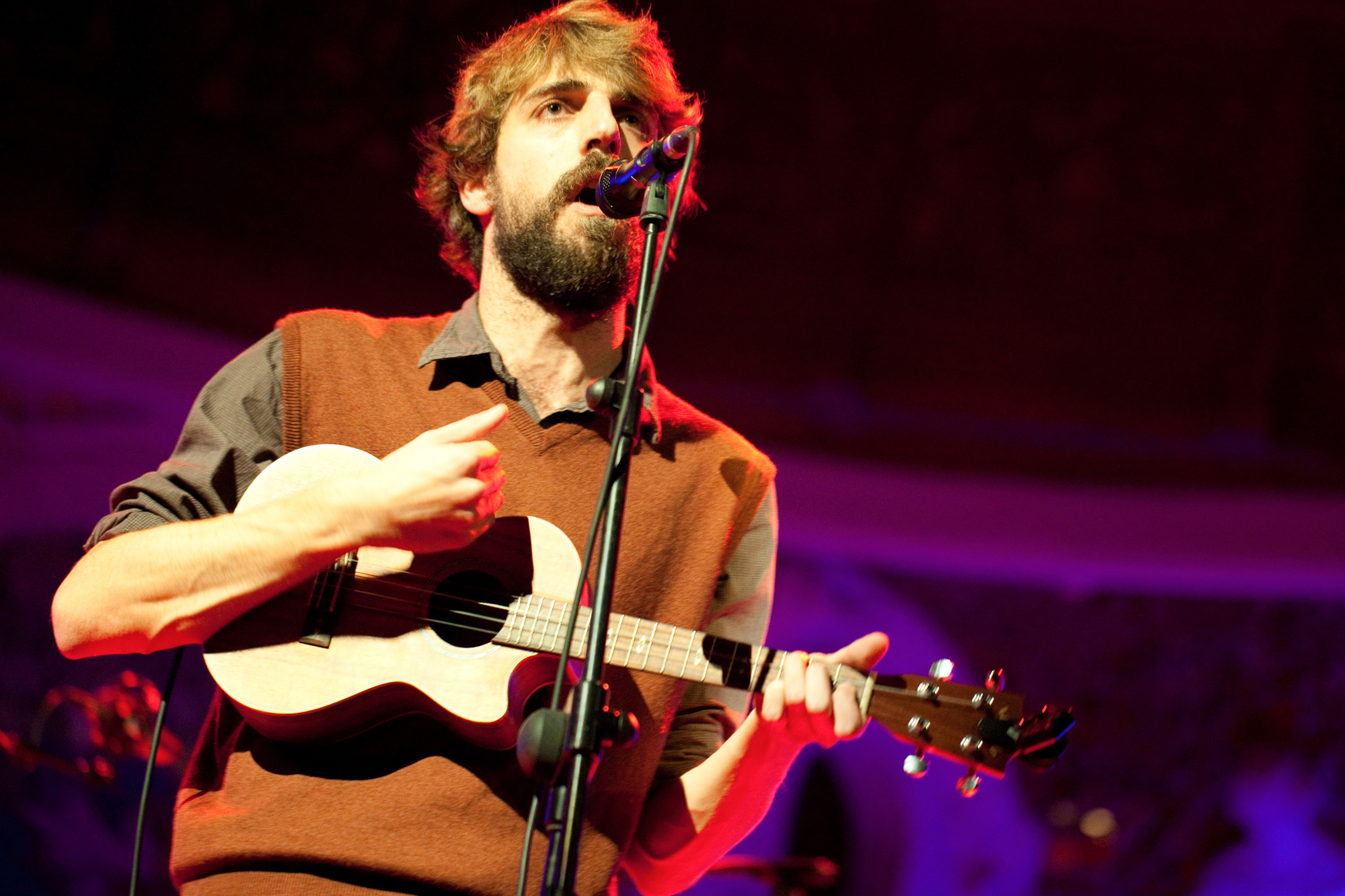 MANEL - Palau de la Música Catalana (15/01/2010)